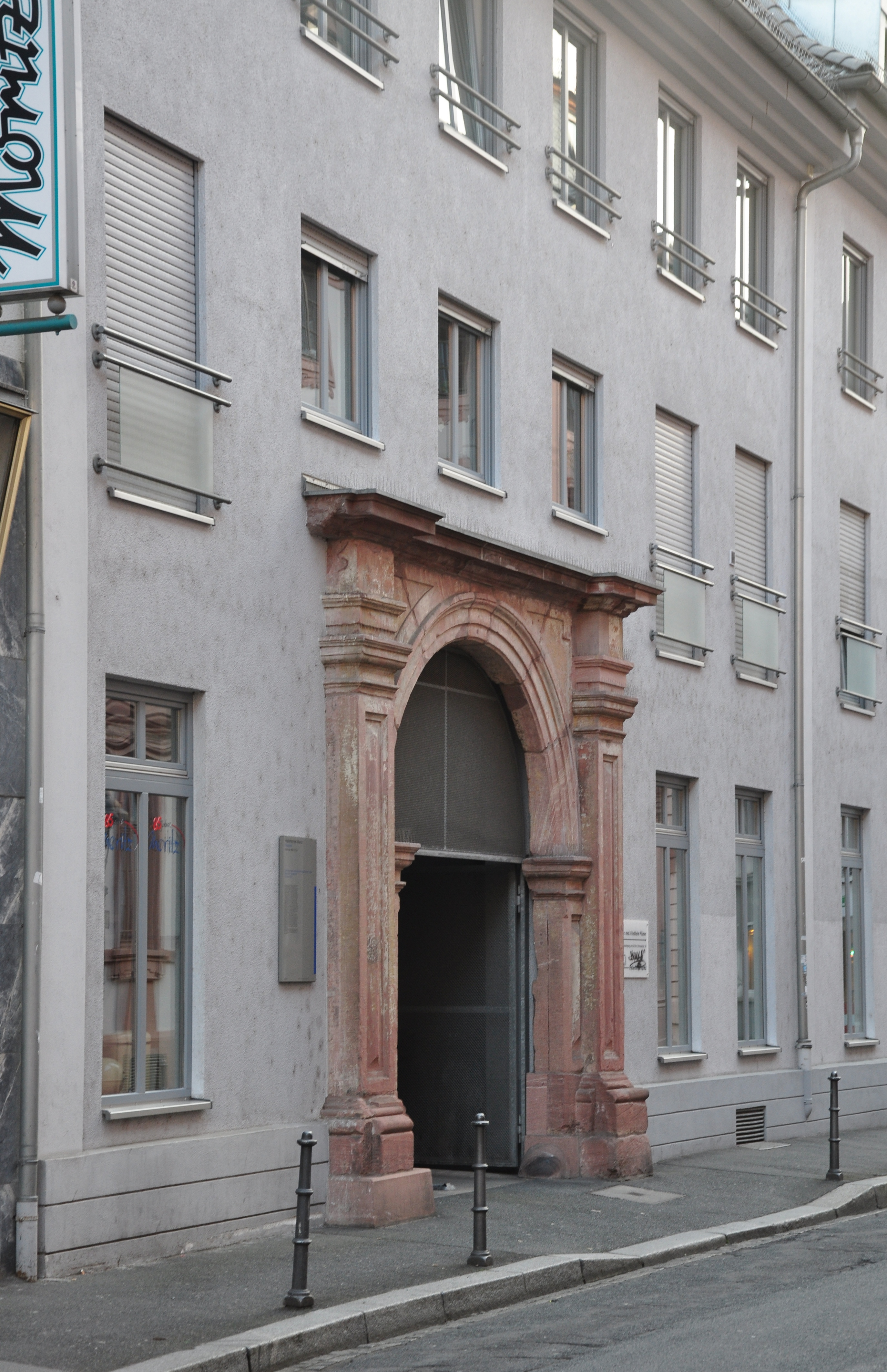 Mainz, ehemaliger Ingelheimer Hof, erhaltener Torbogen. Der Ingelheimer Hof entstand 1686/86 als Familienstammsitz für die Familie des regierenden Kurfürst-Erzbischofs Anselm Franz von Ingelheim. Bei der Belagerung von Mainz 1793 wurde der Bau durch preussisch/österreichischen Artilleriebeschuss zerstört.